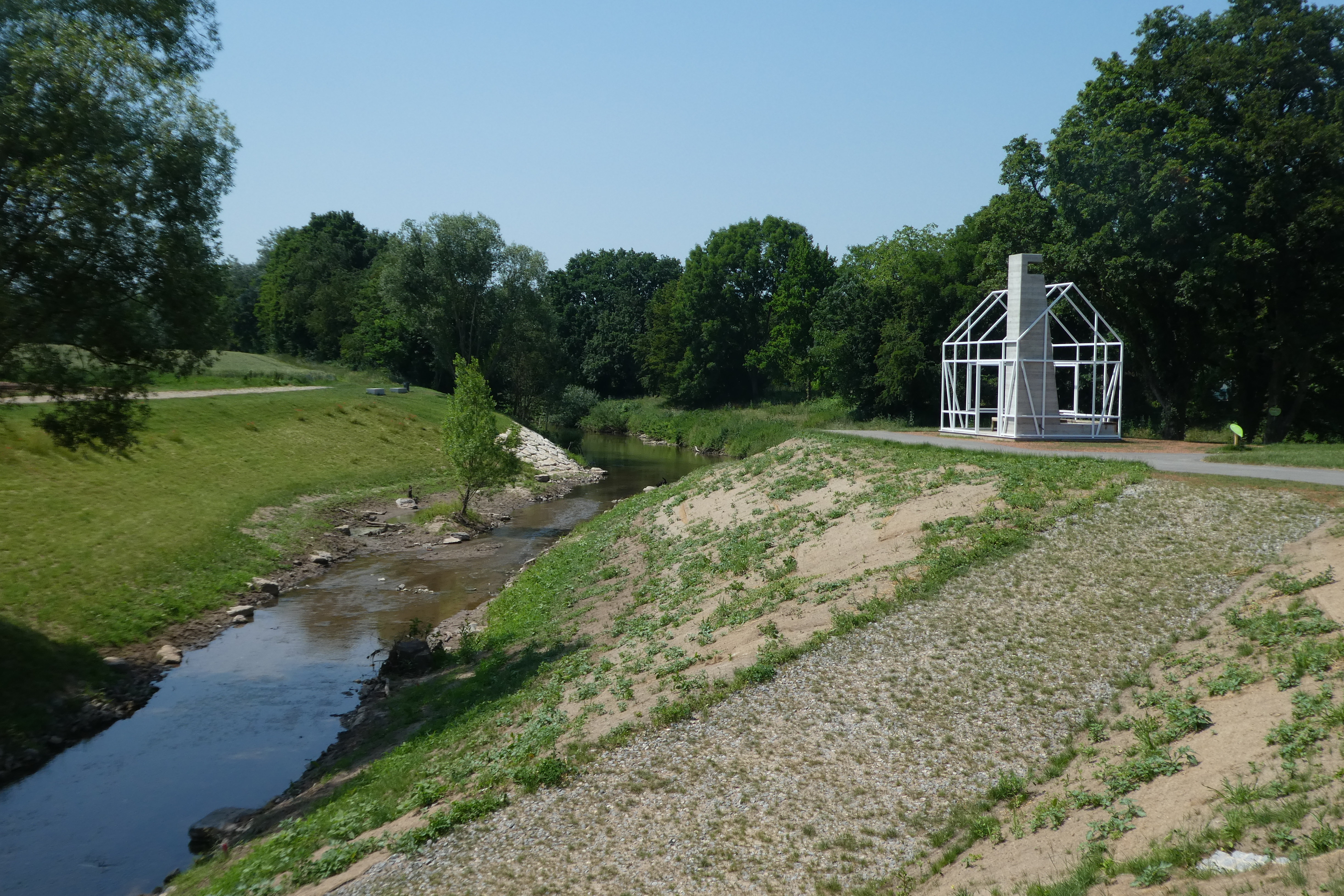 Weinstadt - Mündung des Haldenbachs in die Rems, die im Bild von rechts kommt. Das weiße „Kaminhaus“ steht auf der Landzunge „Birkelspitze“ und wurde anlässlich der Remstal-Gartenschau 2019 geschaffen.